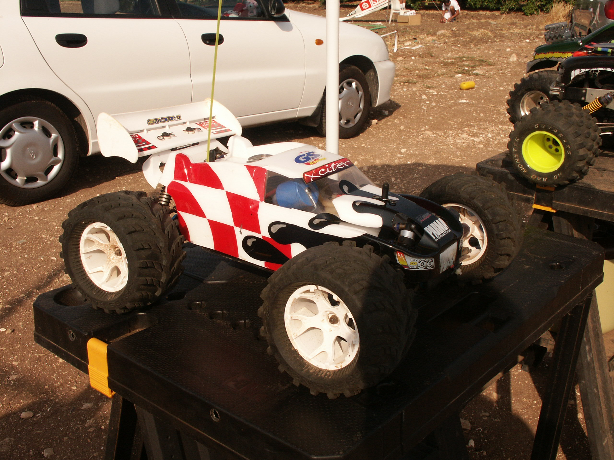 מונסטר טראק